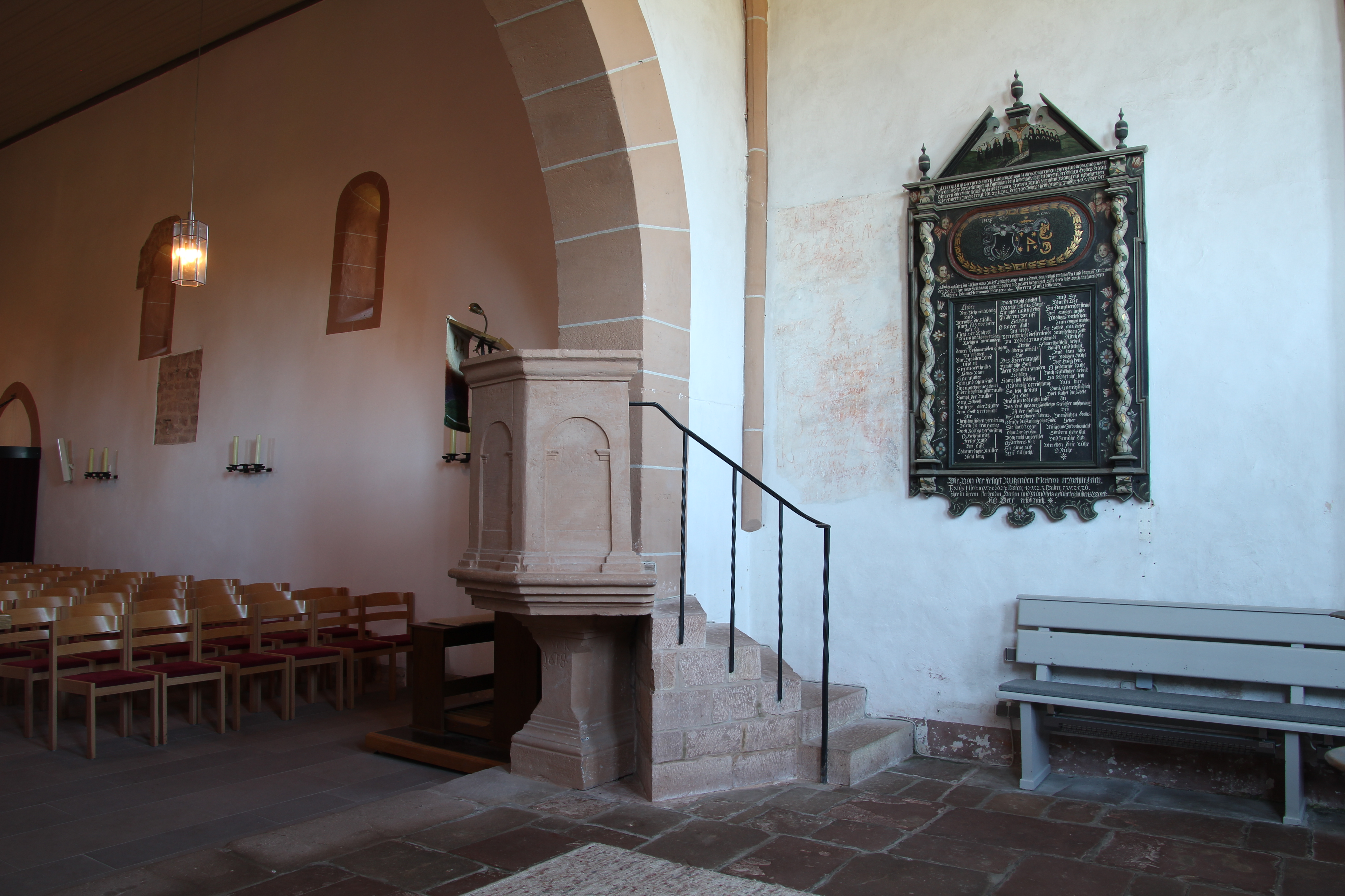 Christenberg